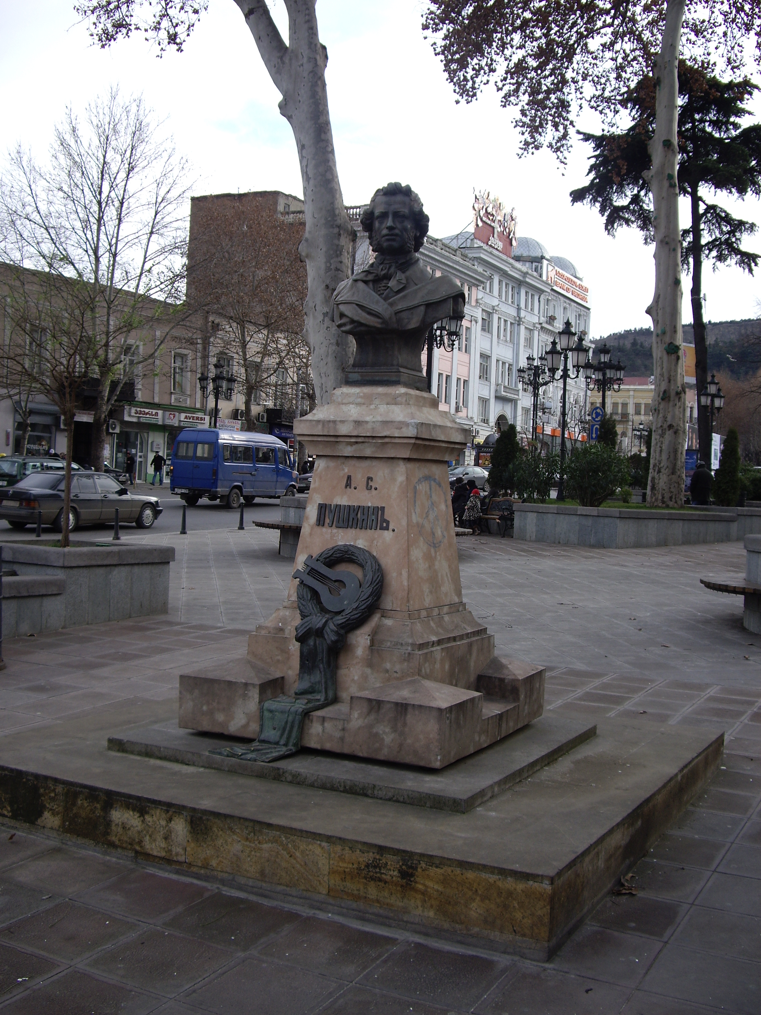 ალექსანდრე პუშკინის ძეგლი თბილისში